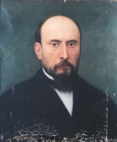 Ritratto di Isidoro La Lumia, Biblioteca Comunale di Palermo, olio su tela.